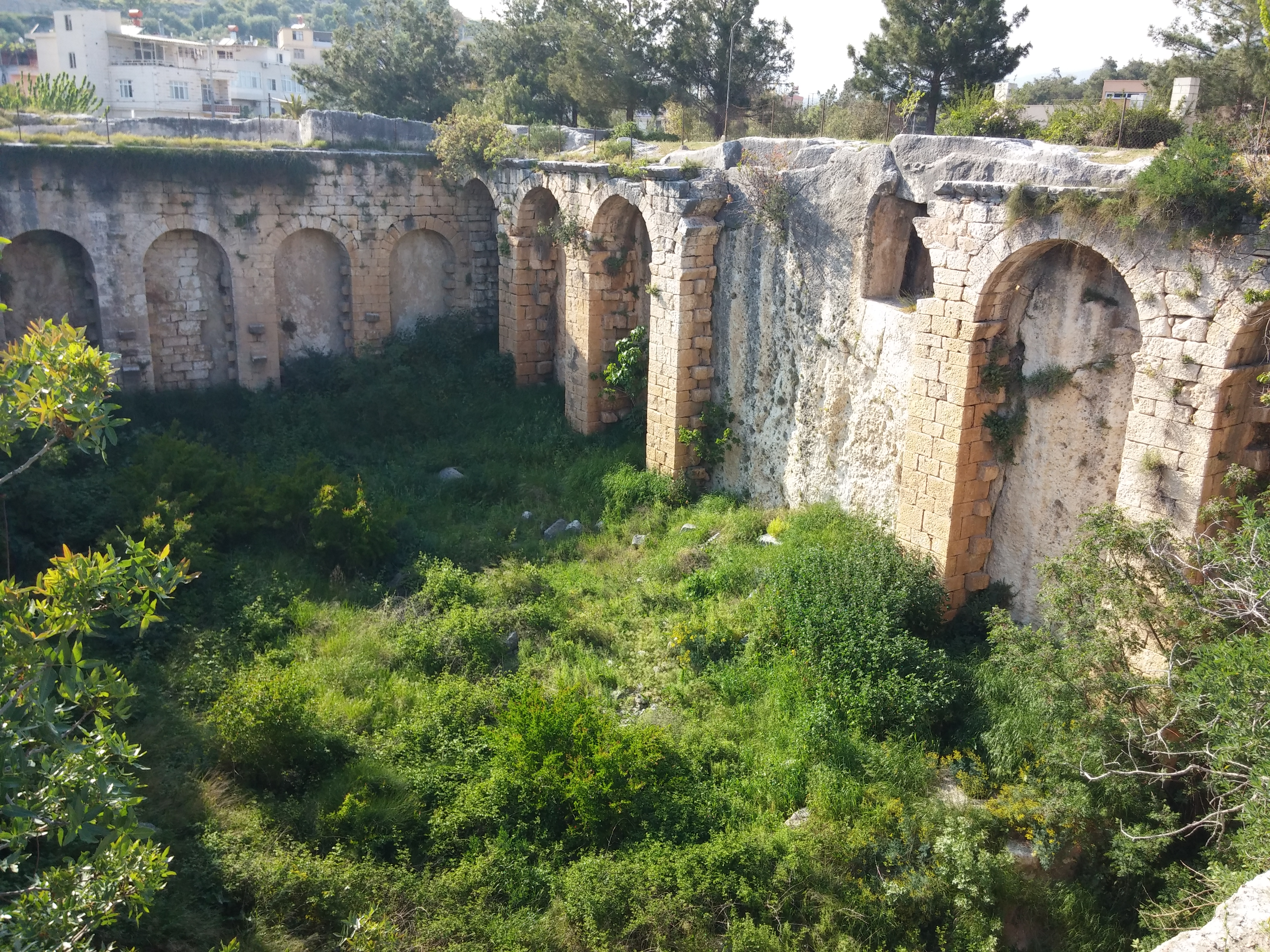 Silifke'de bulunan Tekir Ambarı'ndan bir görünüm